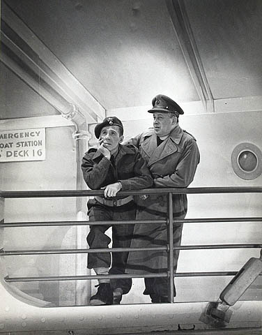 Le Padre (Albert Duquesne) et Tit-Coq (Gratien Gélinas) à bord du bateau, représentation de "Tit-Coq" au Monument National.